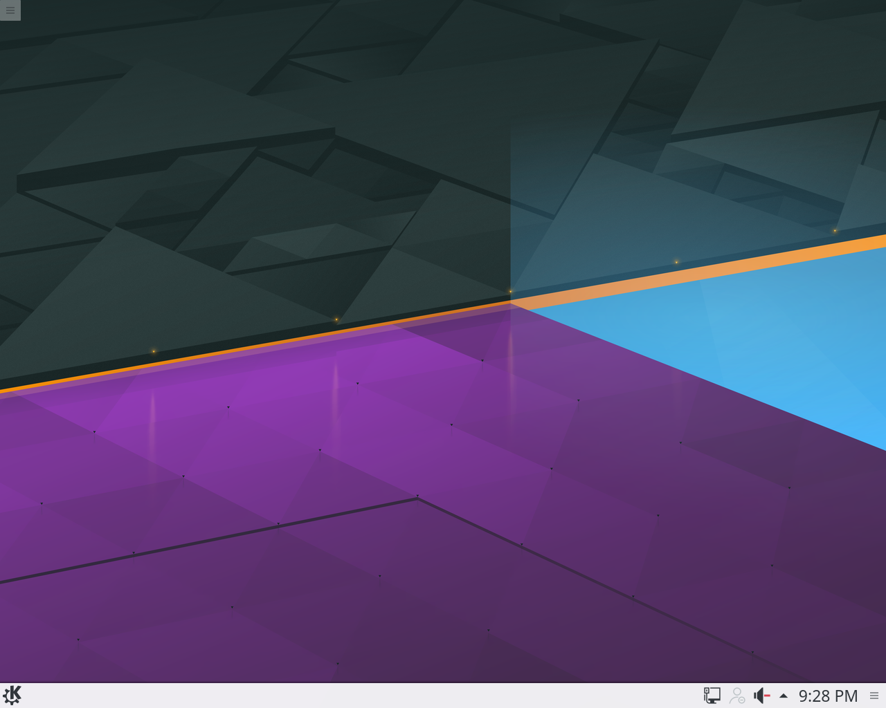 Frugalvaro kun KDE grafika labormedio.